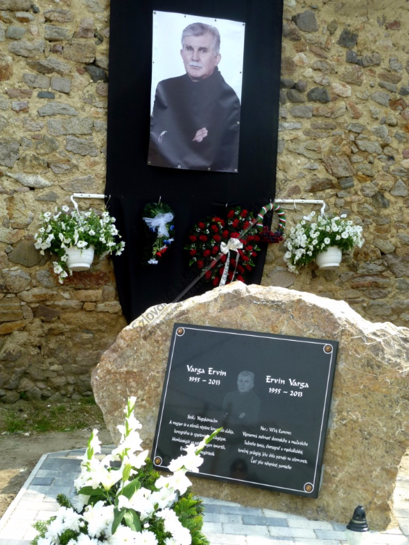 Magyar